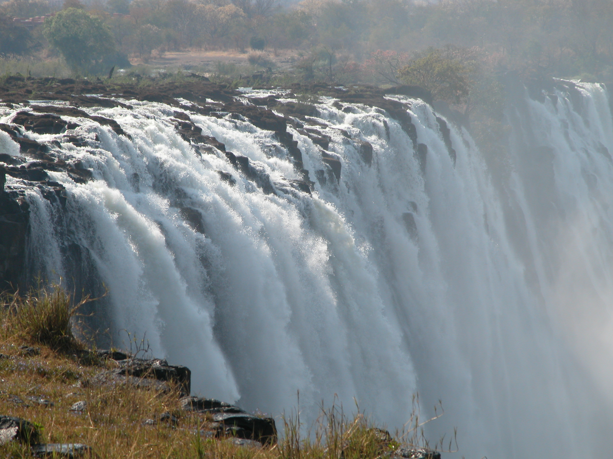 Cascate Vittoria. Foto personale scattata da me nell'agosto 2004 shaka (you talkin' to me?) 11:42, Mar 25, 2005 (UTC)